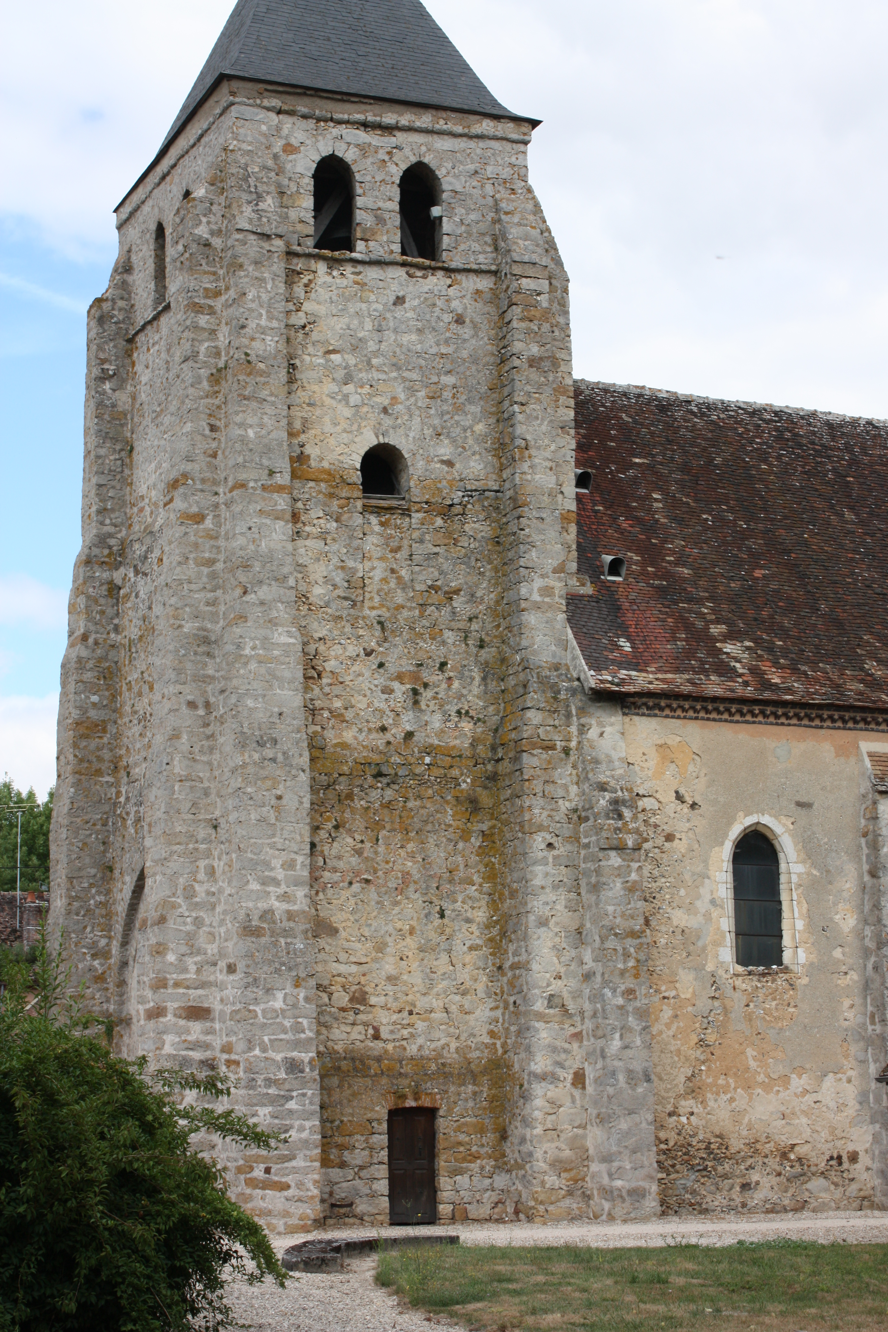 Eglise de Molinons